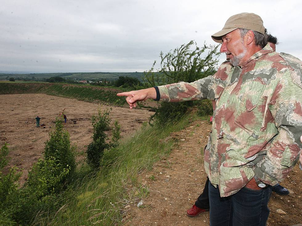 PhDr. Petr Holodňák na výzkumu nedaleko Břežan na Žatecku.